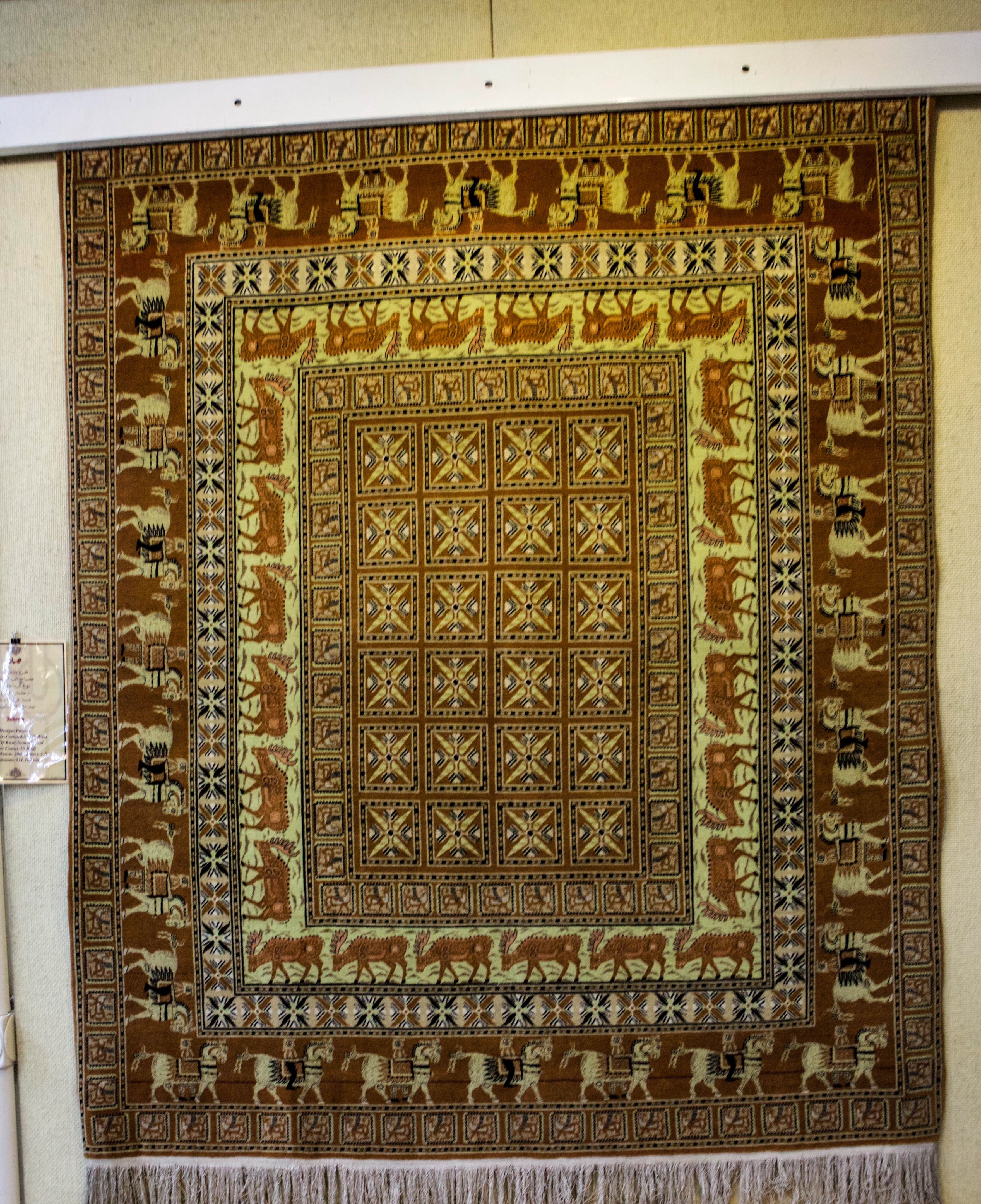 نمونه مشابه قالی پازیریک که در موزه فرش ایران به نمایش گذاشته‌شده‌است.